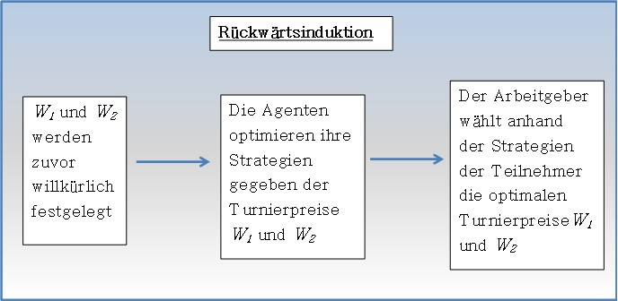 Durch die Rückwärtsinduktion werden diejenigen Turnierpreise ermittelt, die die optimalen Anreize schaffen. (in Anlehnung an: Lazear E.P., Rosen S.(Oct. 1981):Rank-Order Tournaments as Optimum Labor Contracts, Journal of Political Economy,Vol. 89, No. 5, S.841-864)